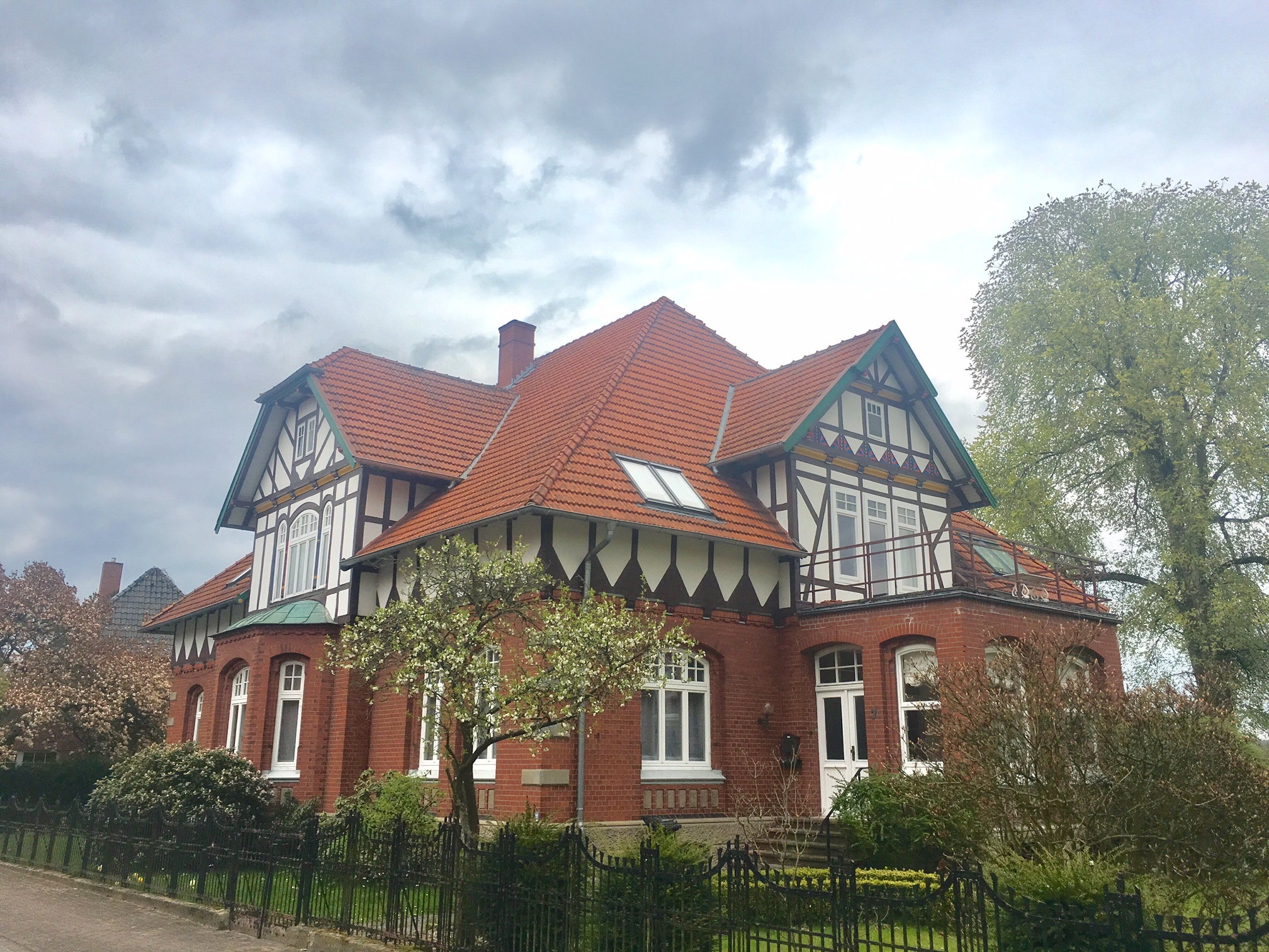 Bauernhaus in Emmendorf, Alte Dorfstraße